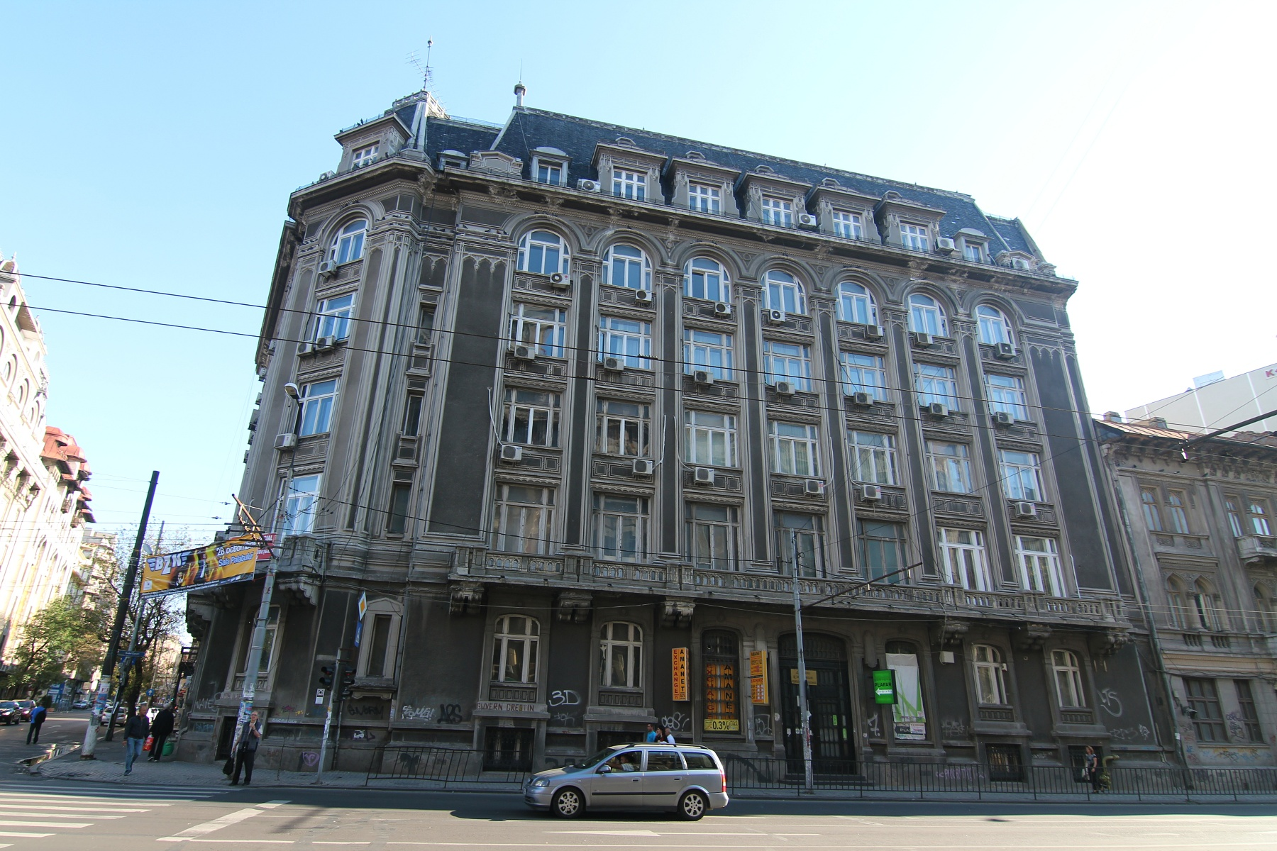 Fostul Imobil „Astra“